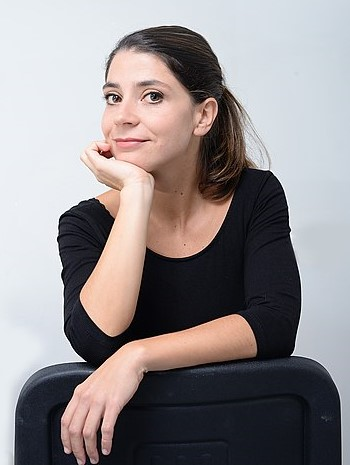 Aida Oset